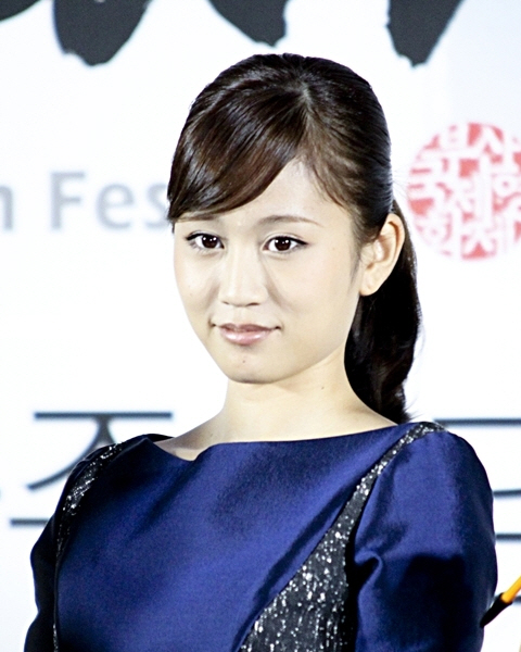 부산국제영화제 131004 마에다아츠코 아주담담